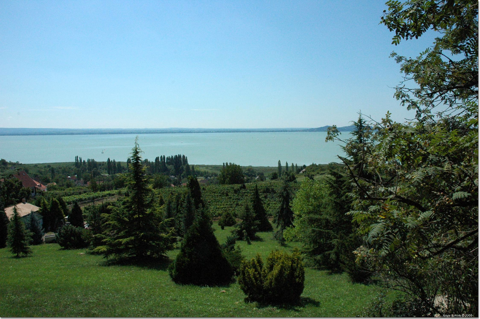 Folly arborétum Balaton panoráma a fenyőmúzeumból